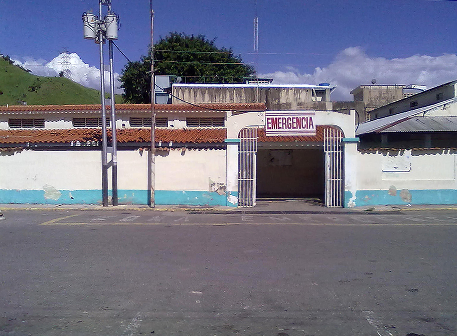 Centro médico de Mariara, Venezuela